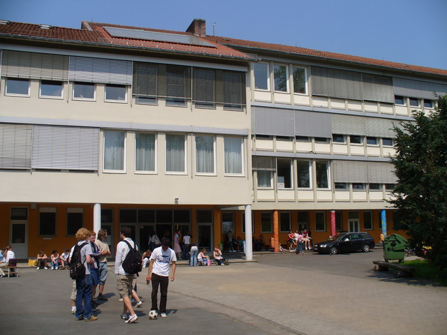 Bild zeigt das Hauptgebäude der Elisabethschule.